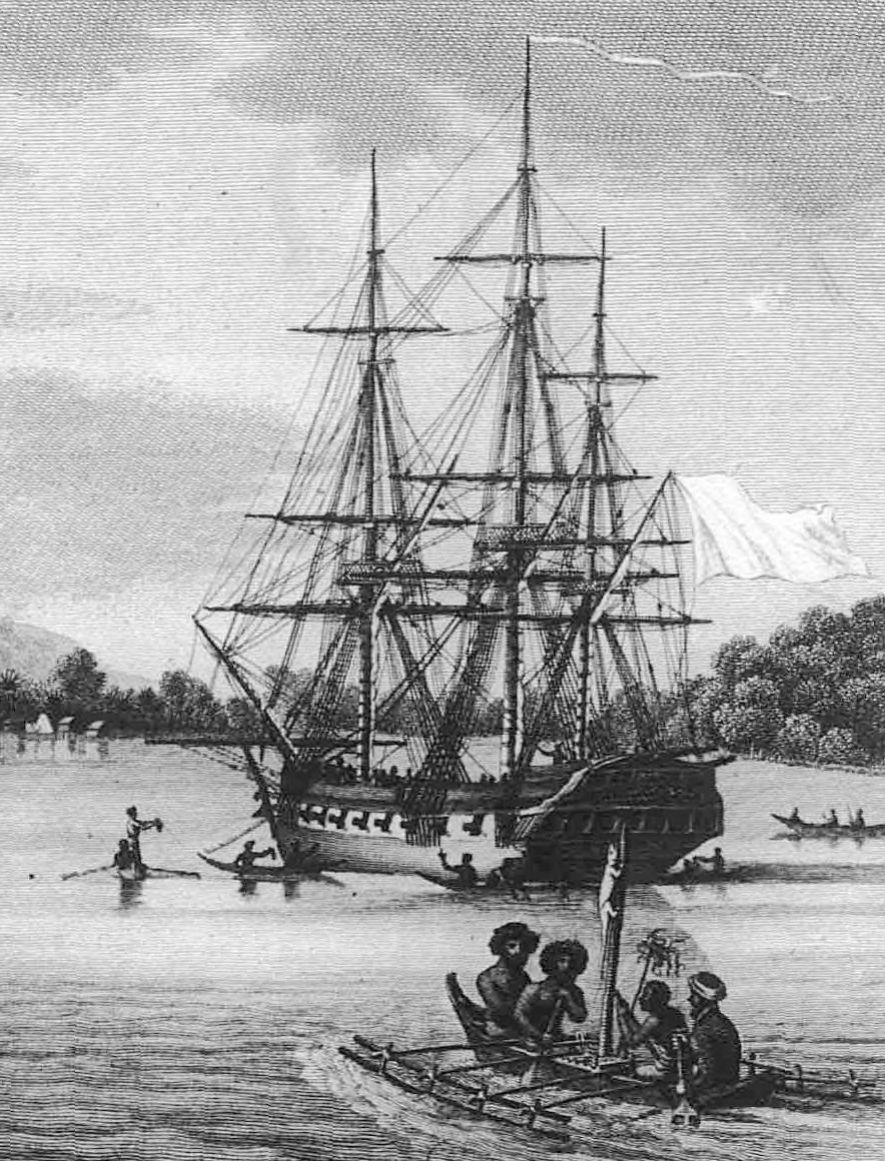 Île des Papous : vue du mouillage de l'Uranie sur l'île Rawak (détail)